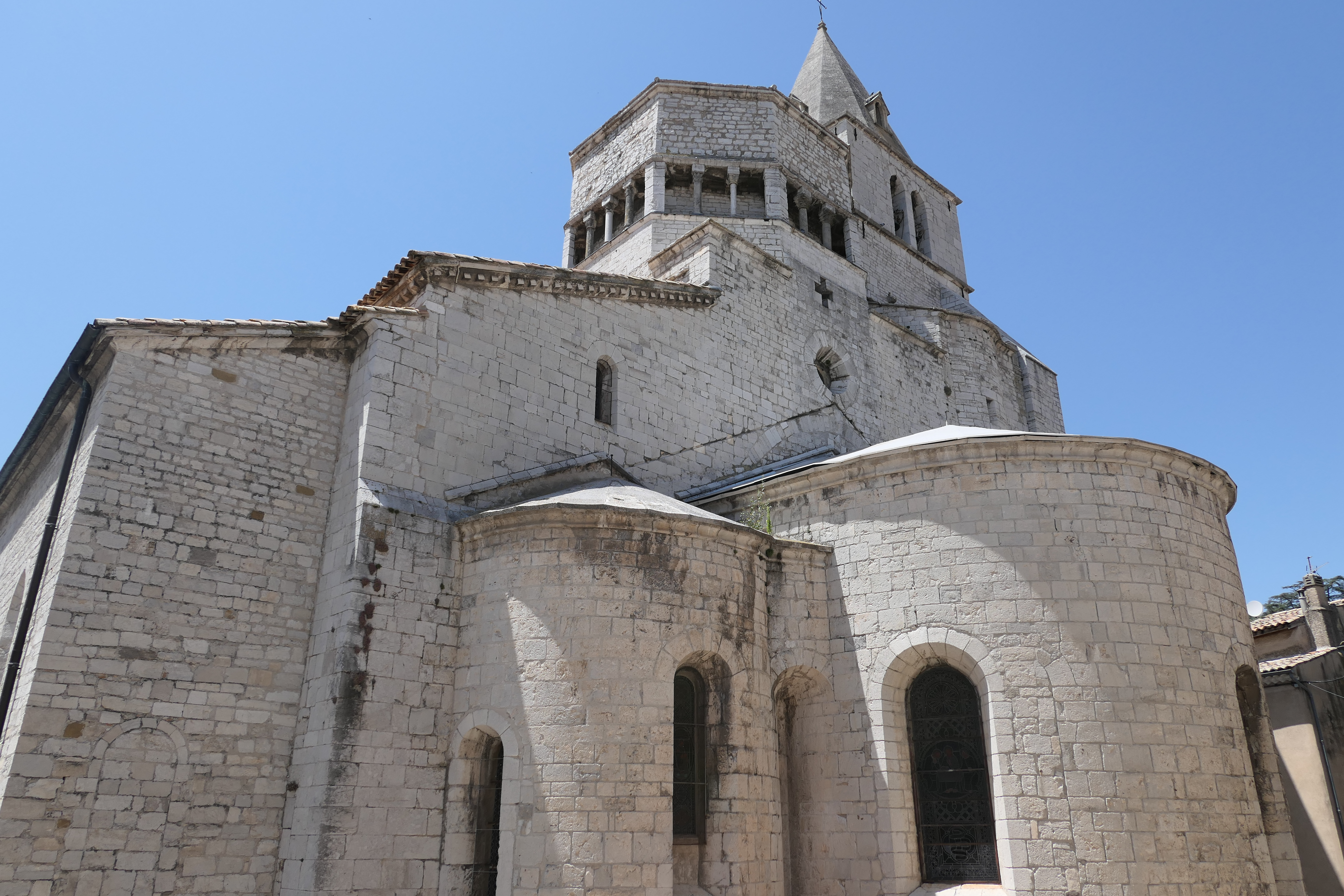 Cathédrale Notre-Dame-des-Pommiers de Sisteron Apsis